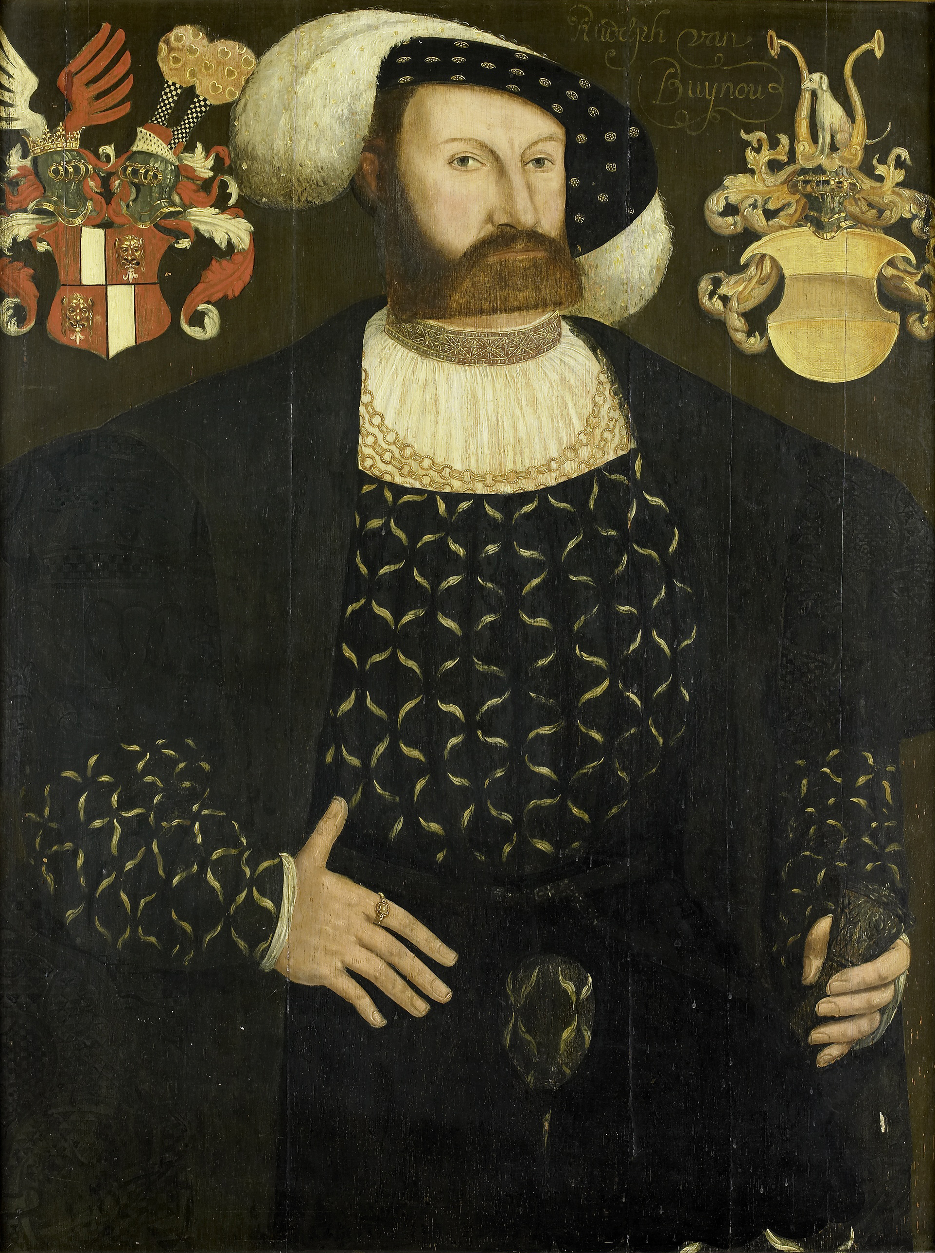 Portret van Rudolph van Buynou, drost van Stavoren en grietman van Gaasterland, vermoedelijk postuum. Kniestuk, met de linkerhand op het gevest van een zwaard. Op de achtergrond twee wapens. Pendant van SK-A-1994.